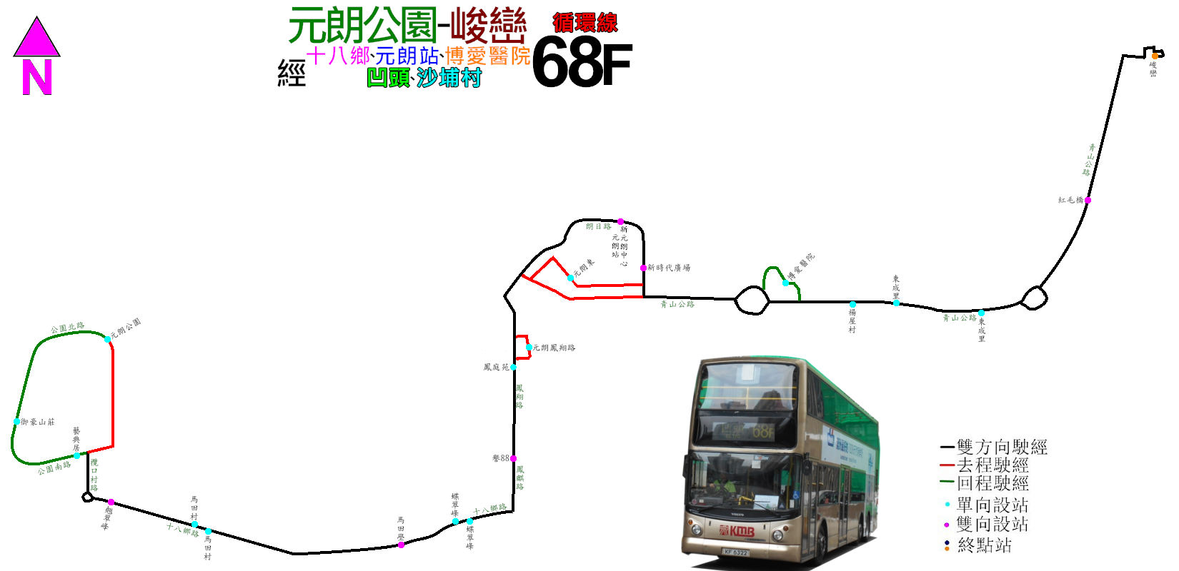 中文（香港）: 九巴68F線的走線圖